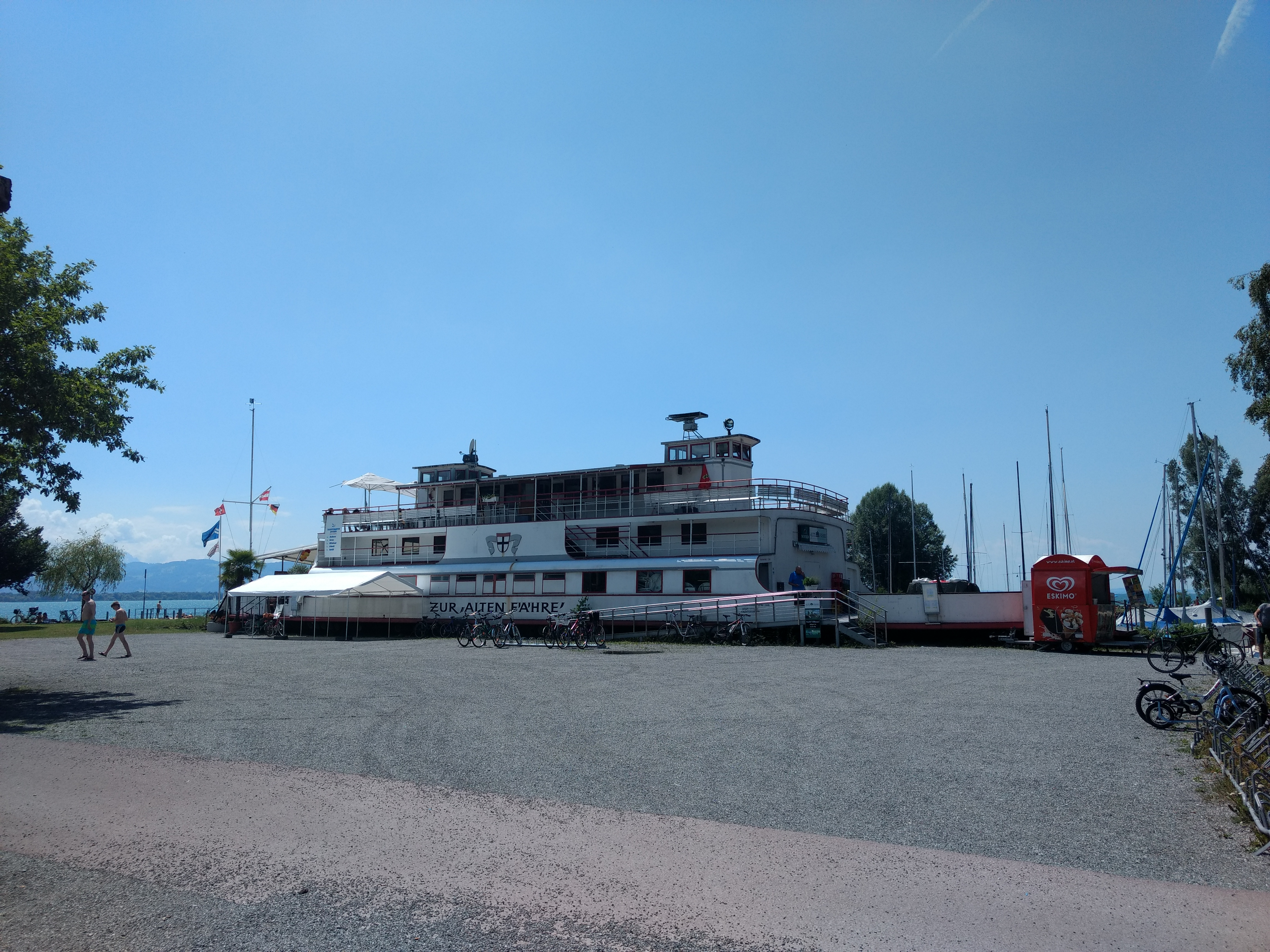 Die ehemalige Motorfähre Meersburg von 1939 dient heute als Lokal im Hafen von Lochau